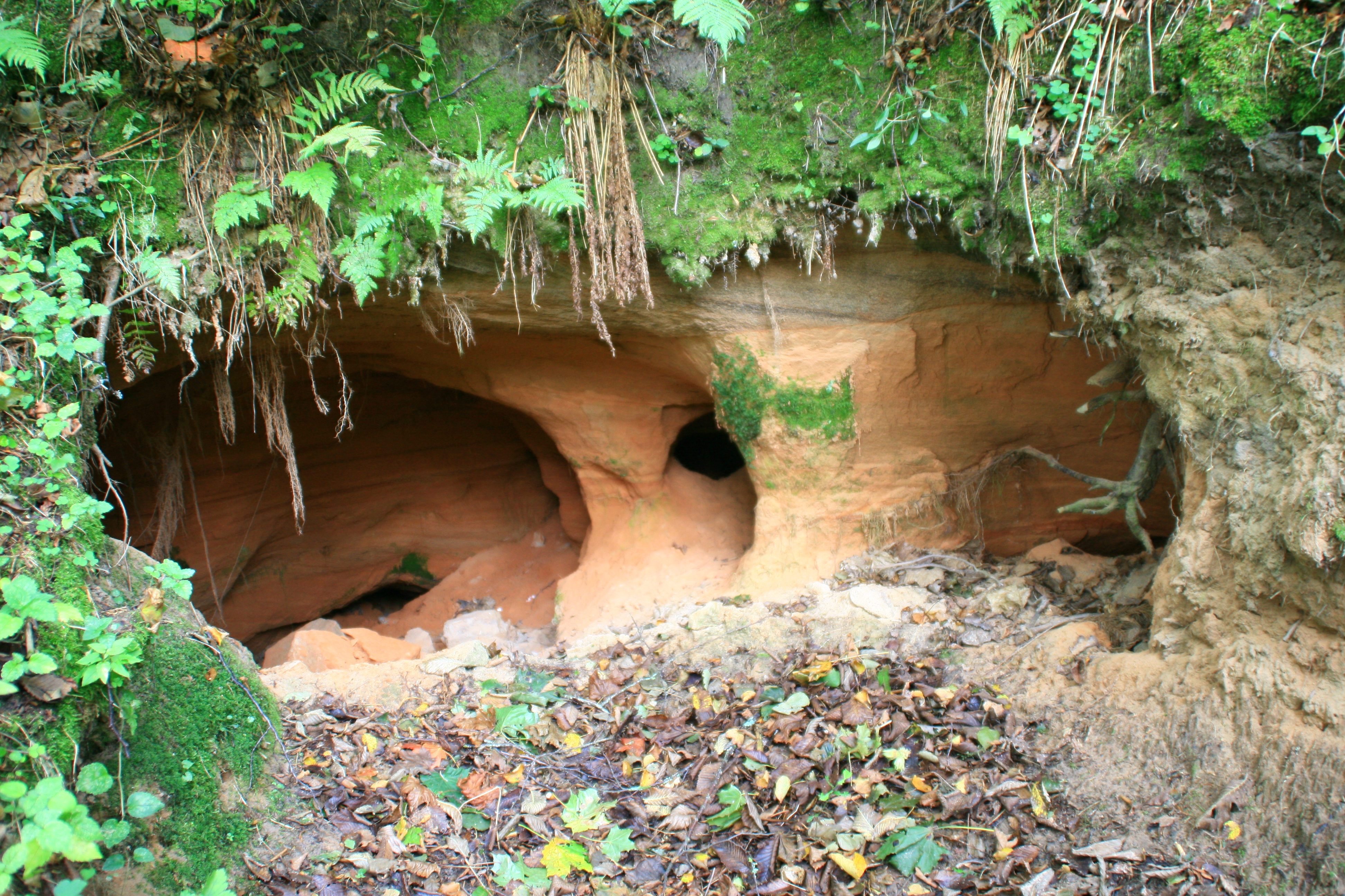 Svētmeitu cave